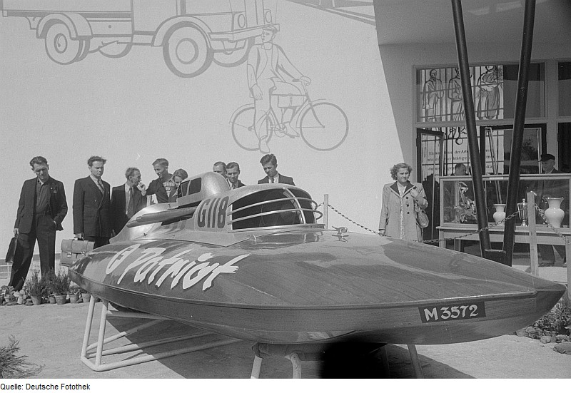 Original image description from the Deutsche FotothekRennboot "Patriot" der VEB Yachtwerft Berlin Köpenick und Besucher der Technischen Messe 1953